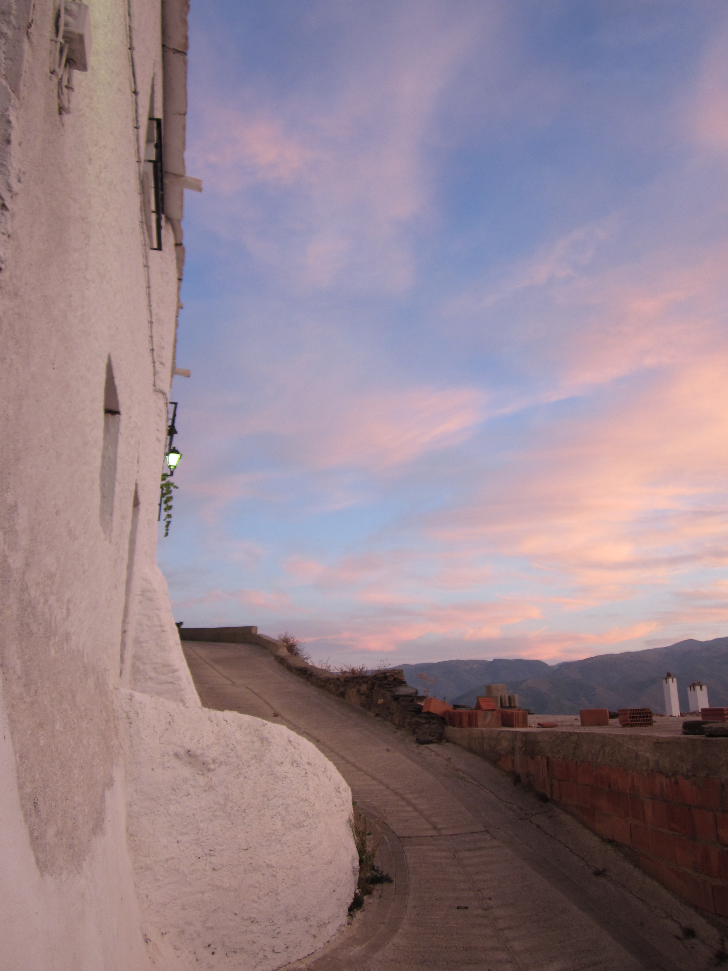 Vistas atardecer en Ohanes